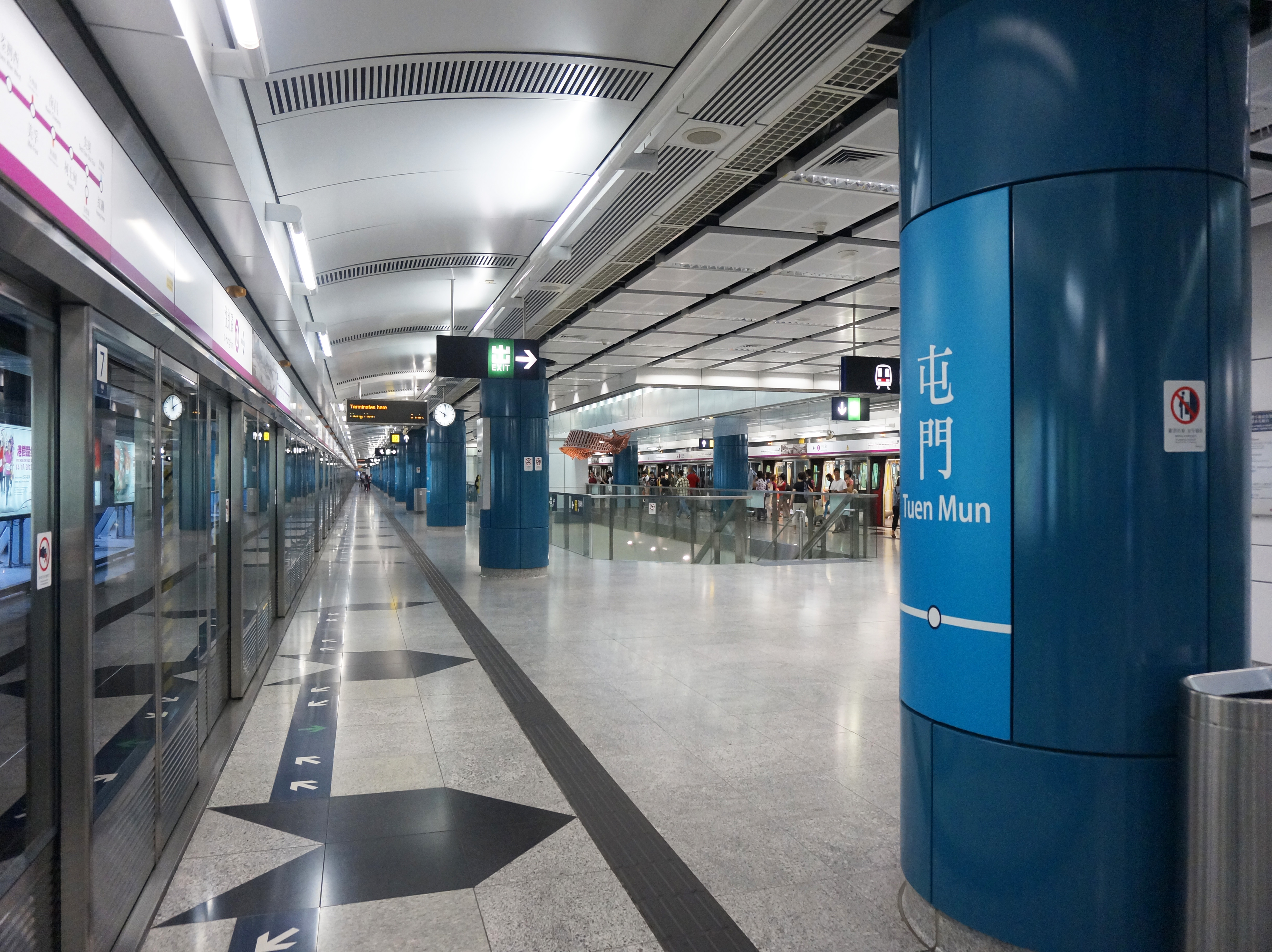 港鐵屯門站月台